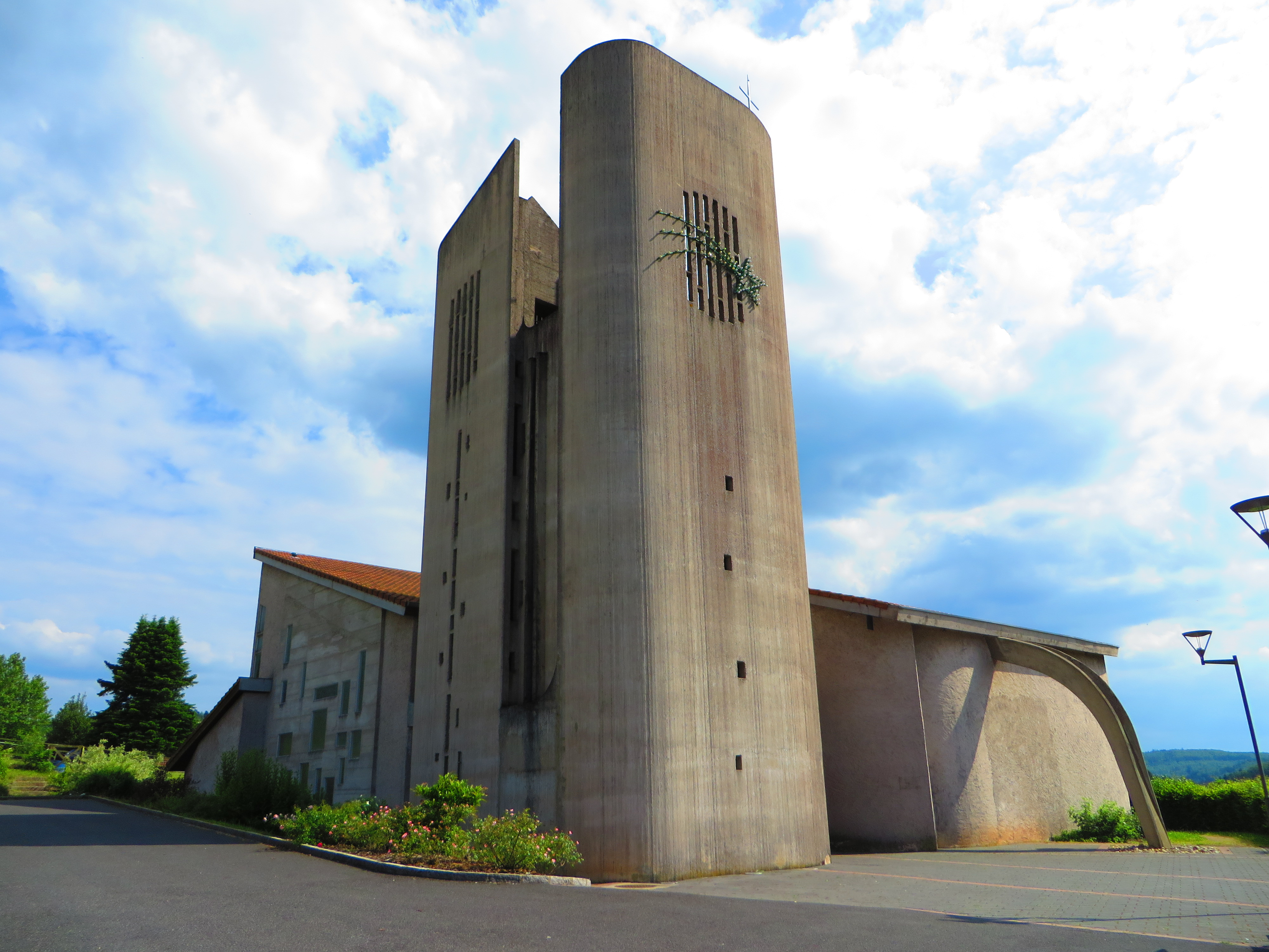 Vasperviller eglise